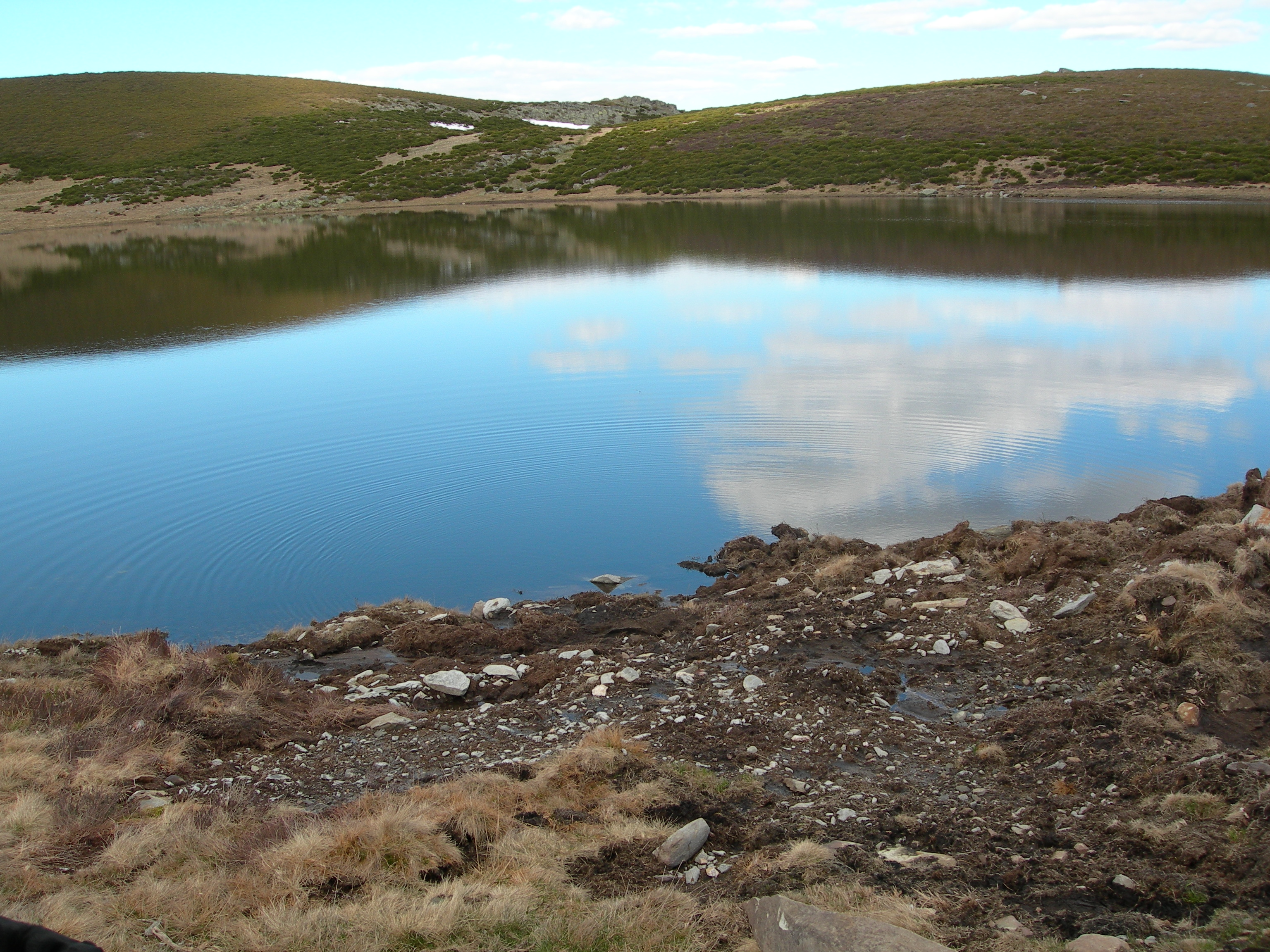 Laguna de las Yeguas, Sanabria, Zamora